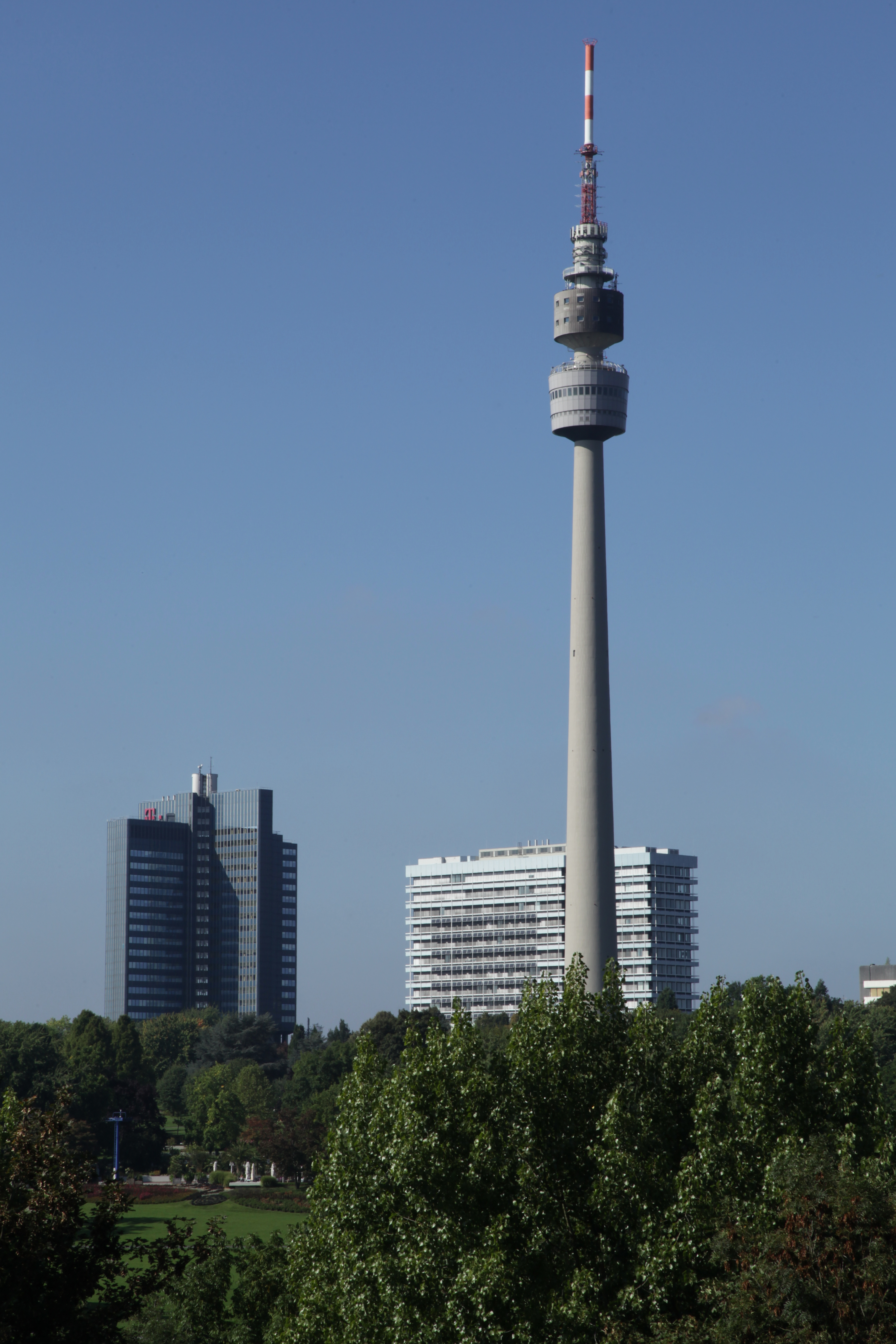 Blick von der Halde Hympendahl zu Telekom-Hochhaus, RWE-Hochhaus und Floriantum in Dortmund